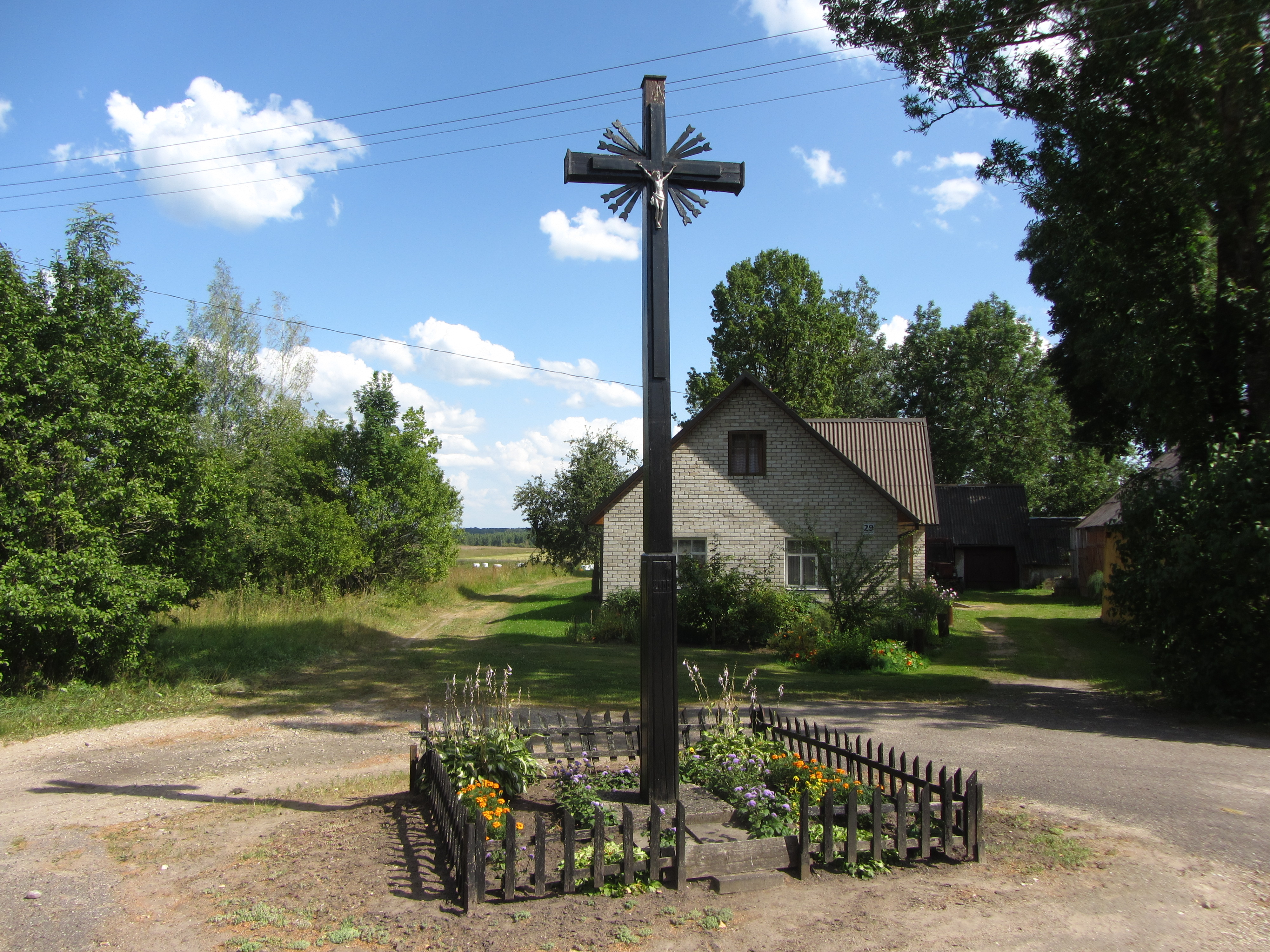 Mėčionys, Lithuania